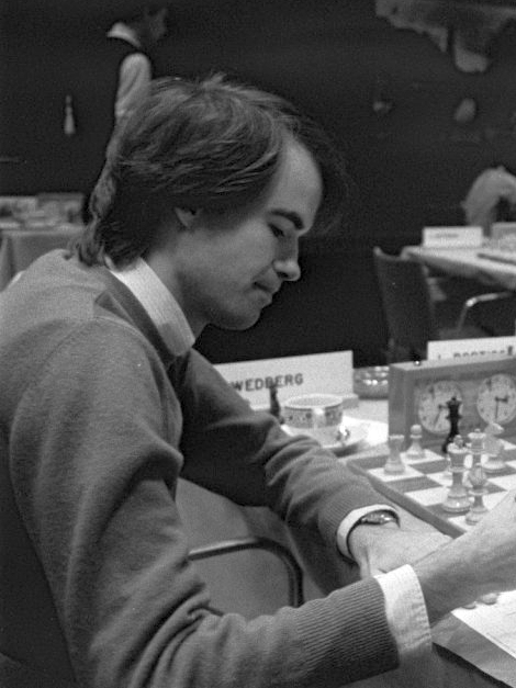 Ohra-schaaktoernooi in Amsterdam 1984; Wedberg.